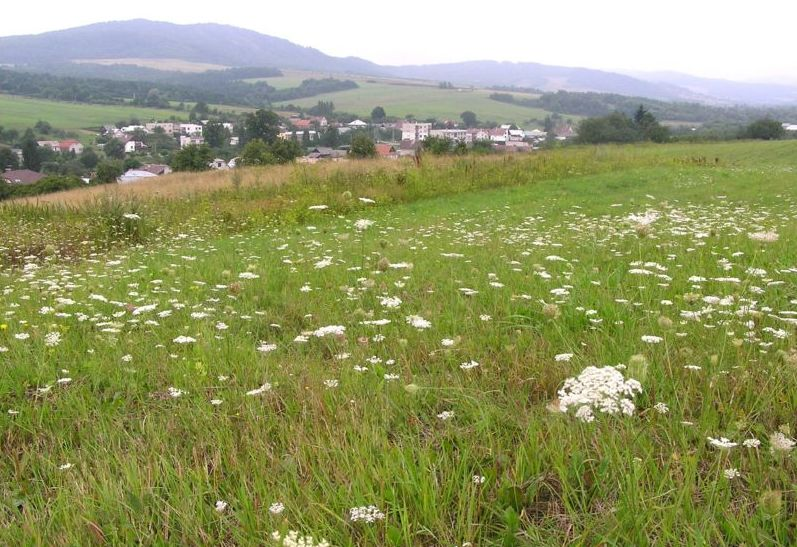 Celkový pohľad